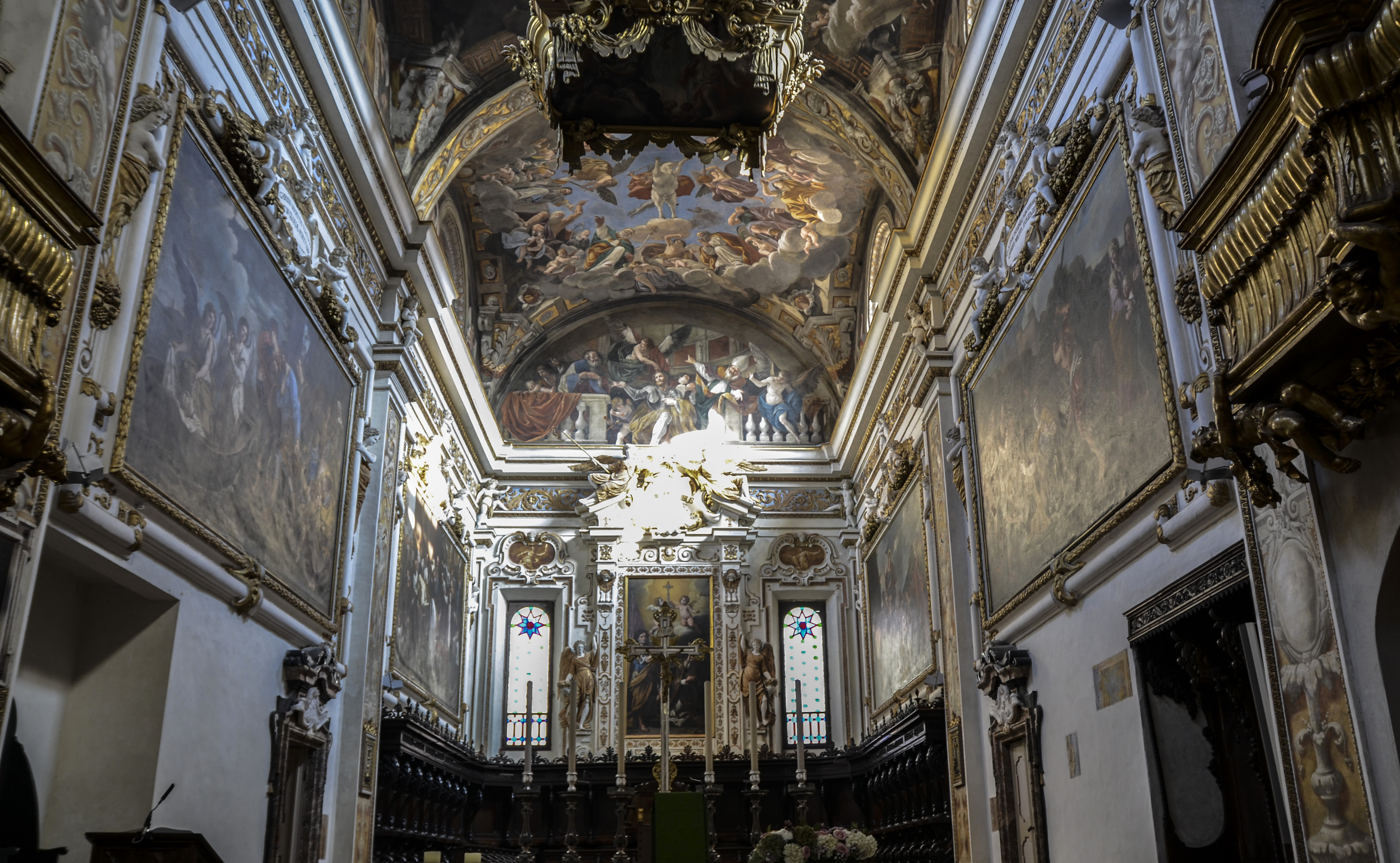 Basilica di Sant'Antonino This is a photo of a monument which is part of cultural heritage of Italy.